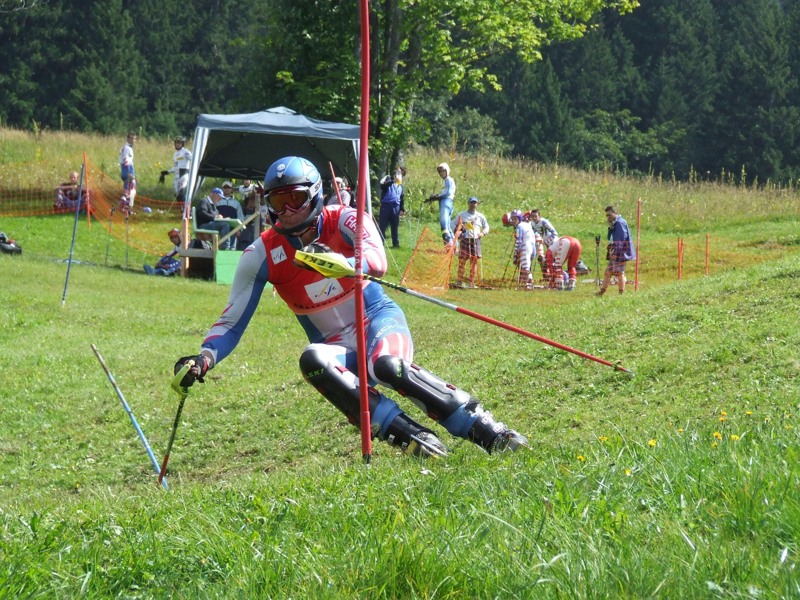 závody SUI